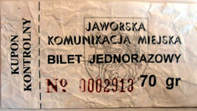 Bilet Komunikacji Gminnej Jawor za 70 gr z lat 90. XX w.